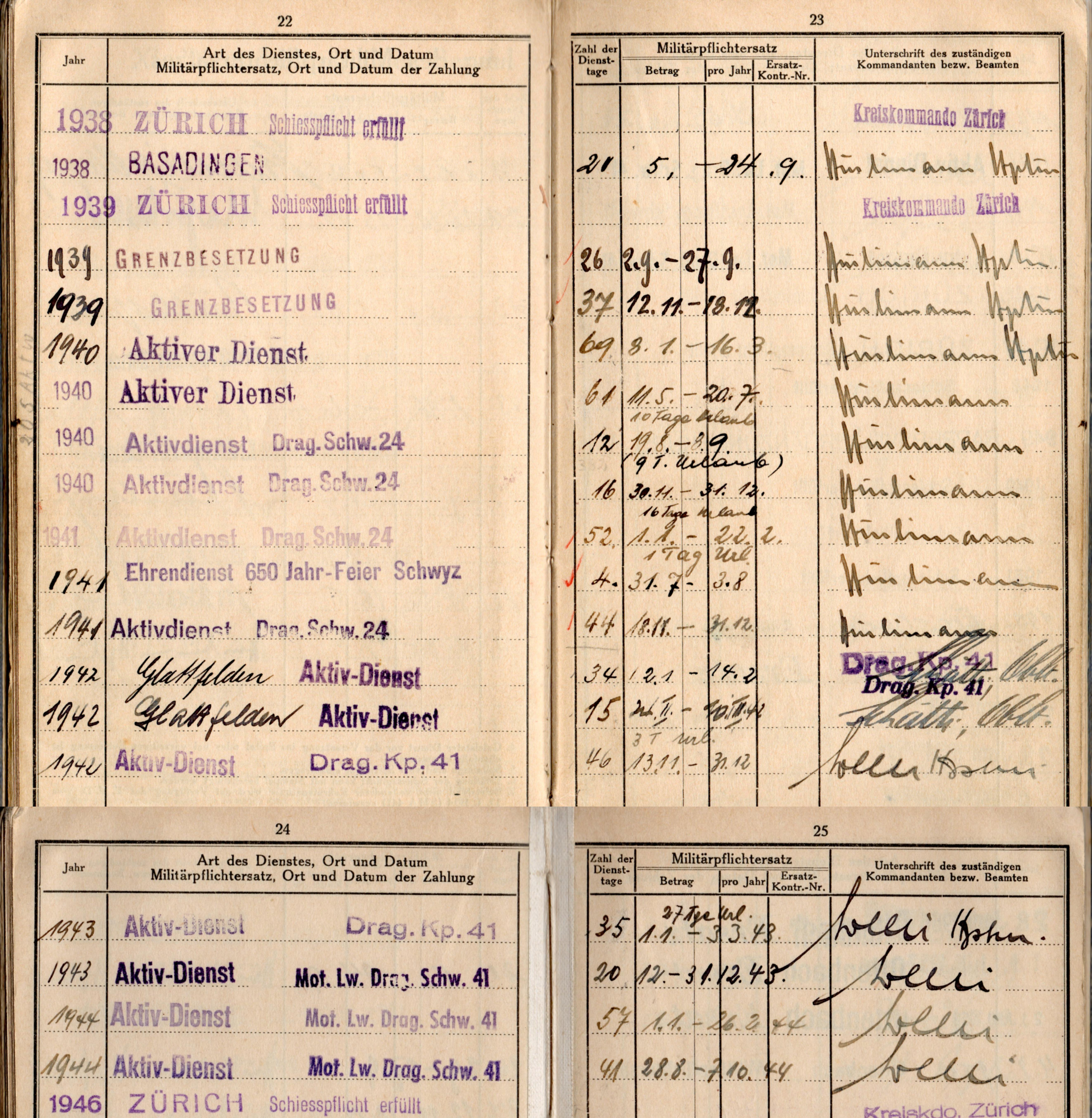 Aktivdienst 1939-1944 in vorgeschobenen Stellungen im Schweizer Mittelland, Dragoner Schwadron 24 und 41